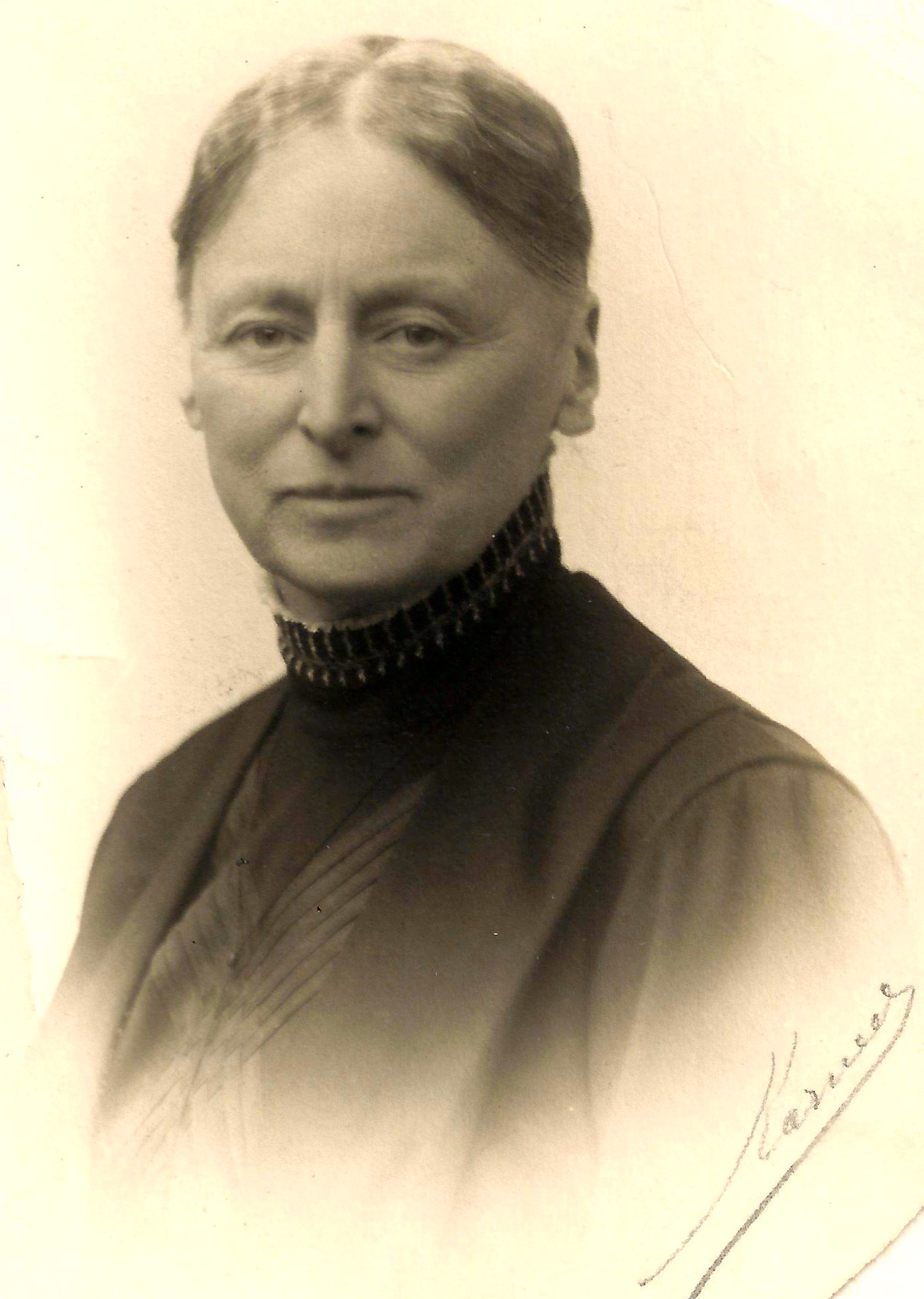 Beatrice Dickson (1852-1941) efter 1908. Fotograf var Anders Karnell, som hade sin ateljé på Kungsgatan 31 i Göteborg 1908-1934.